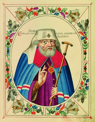 Патриарх Иоасаф II. Миниатюра из Титулярника. 1672 год.